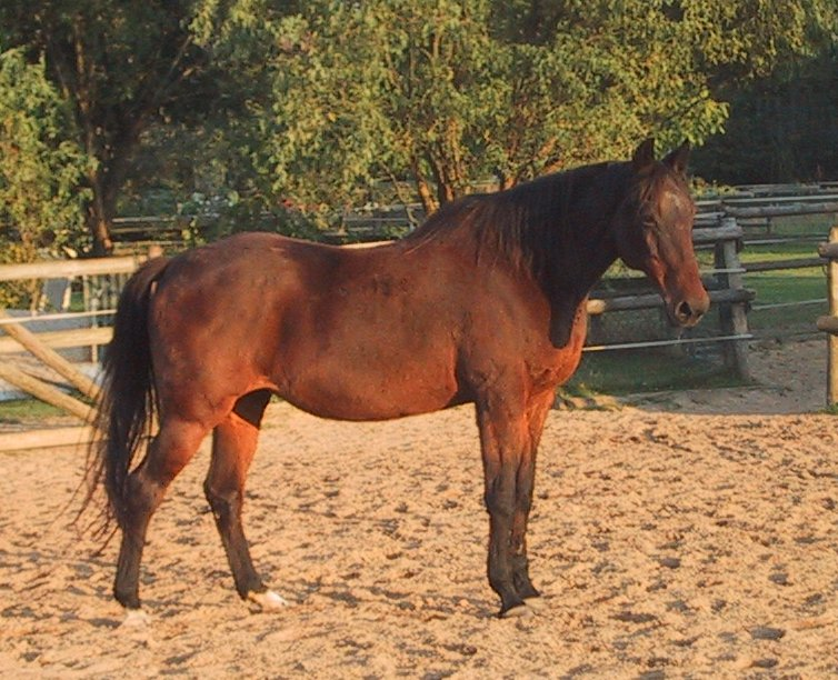 30 jährige Anglo-Kabardiner Stute